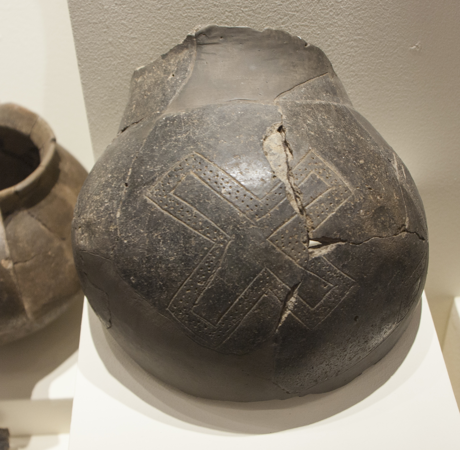 Età del bronzo medio 3 Cultura di Milazzese 1500-1300 a.C. Panarea, Punta Milazzese